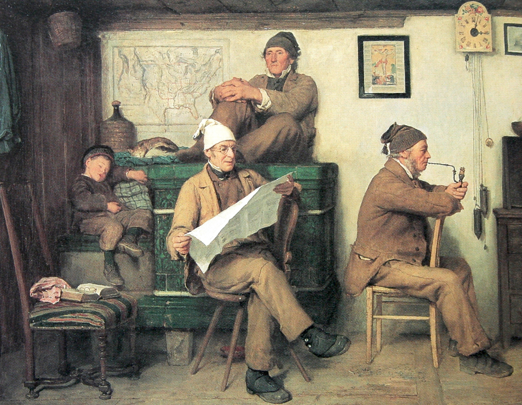 Die Bauern und die Zeitung, Gemälde von Albert Anker, 1867, 64 x 80,5 cm, Privatbesitz